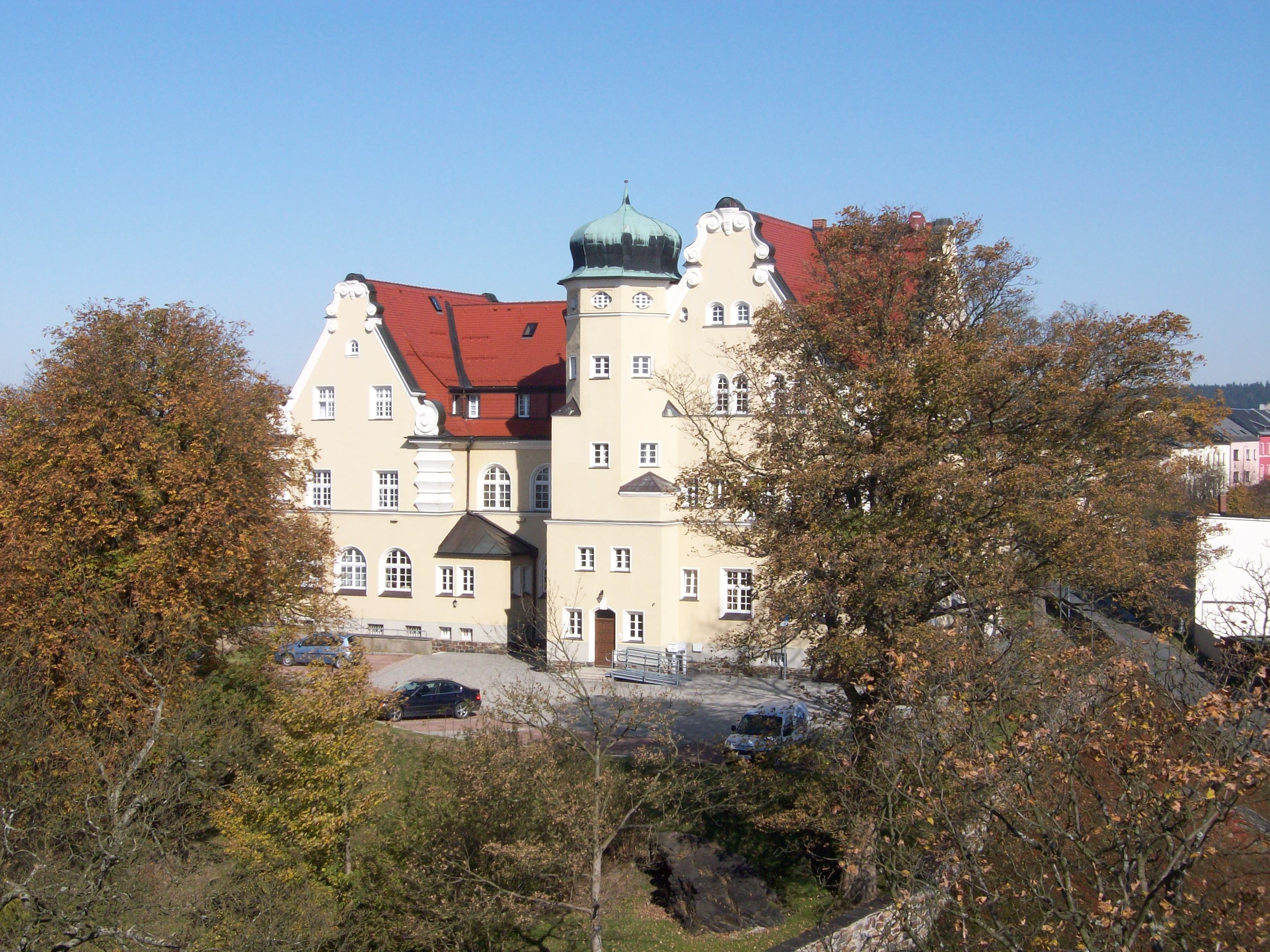 Rathaus von Schöneck im Vogtland: 1923 im neubarocken Stil errichtet. Es soll an das ehemalige Schloß Schöneck erinnern. Es wurde 2003 komplett renoviert. Die aufwendig gestalteten Fenster des Ratssaales sind beachtenswert. Blick auf die dem Alten Söll zugewandte Seite.